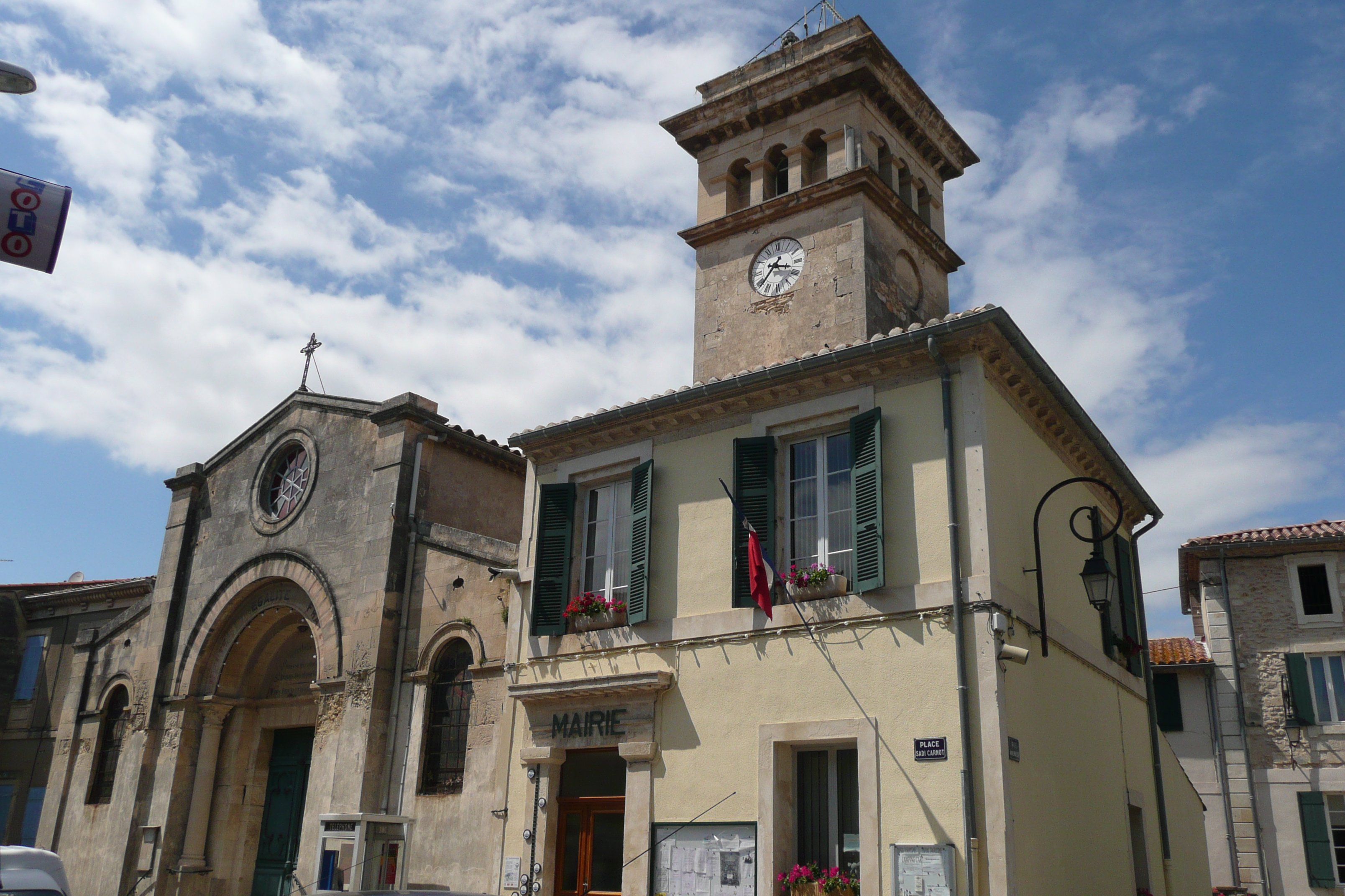 Eglise à Comps (Gard).